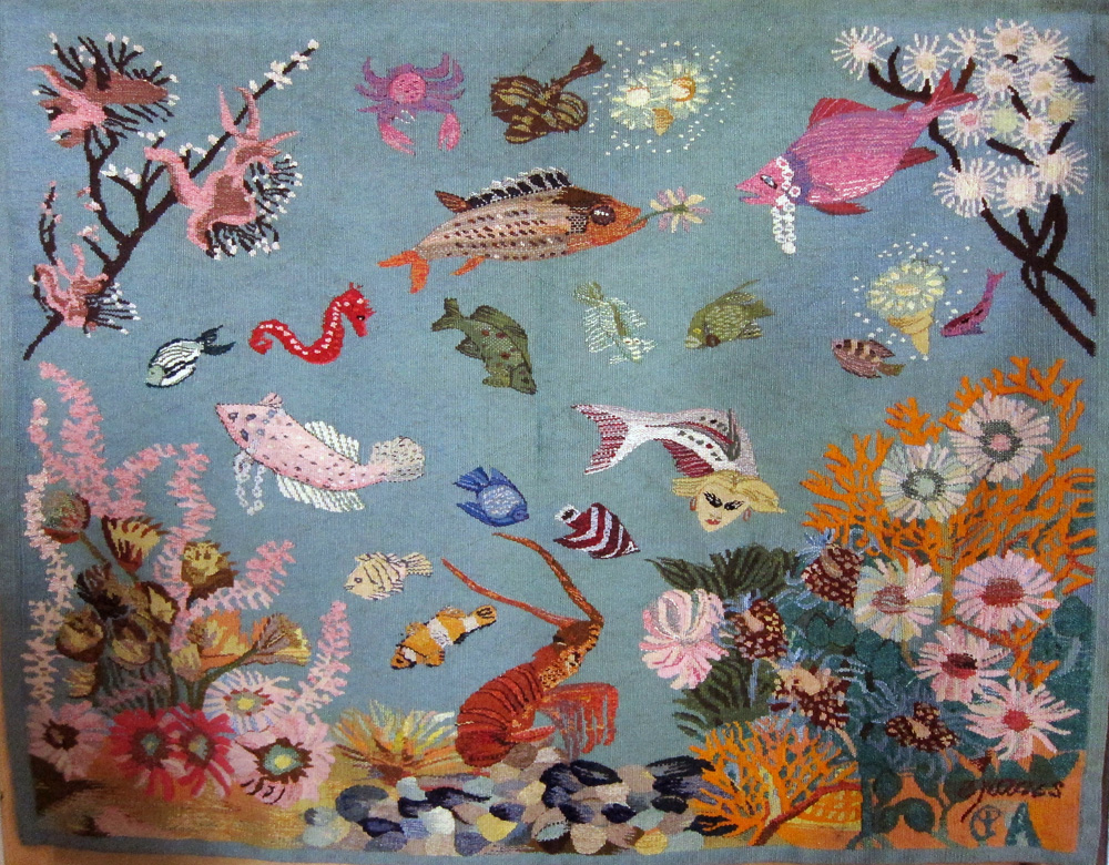 "Les poissons enchantés" 1968 Tapisserie de Grand'mère Paris (121 x 145cm)